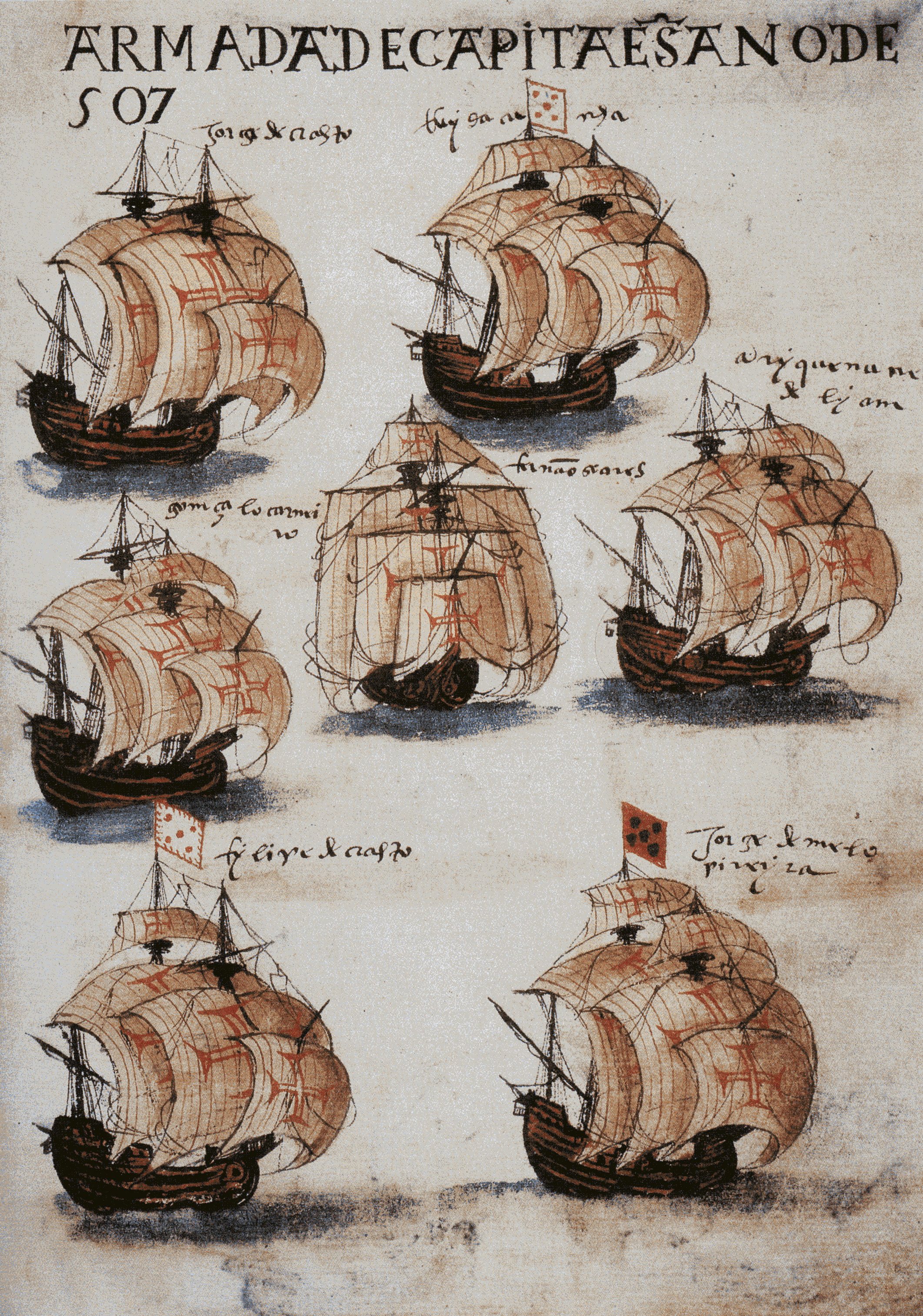 Armada portugaise, Livre de Lisuarte de Abreu'